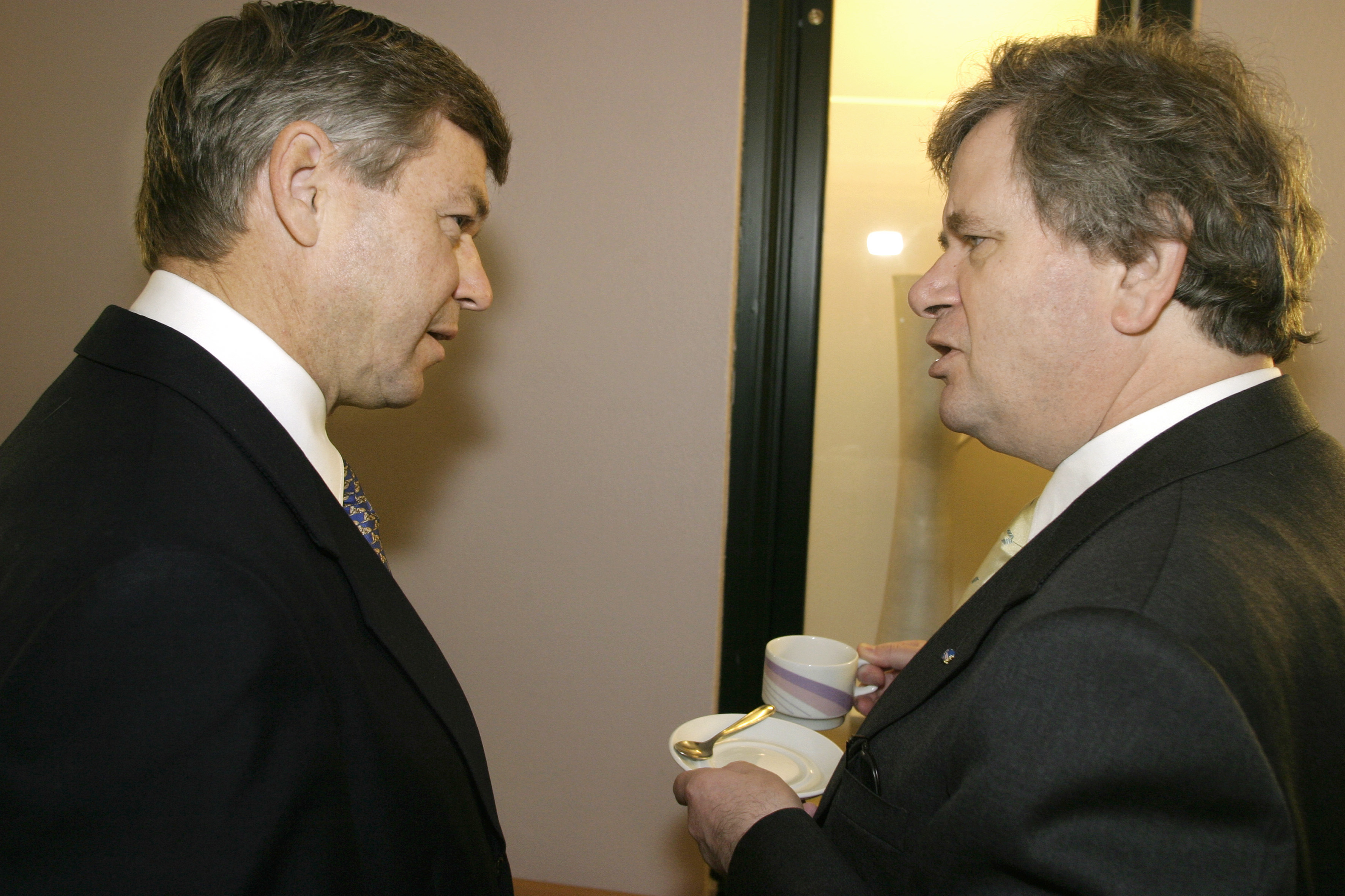 Kjell Magne Bondevik, Norges statsminister och Davíð Oddsson, Islands statsminister. (Bilden är tagen vid Nordiska rådets session i Oslo, 2003)